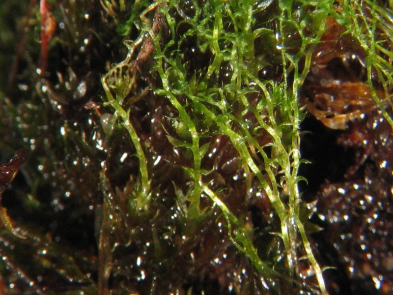 Kreiselfrüchtiges Birnmoos (Bryum turbinatum), etwa 15x vergrößert